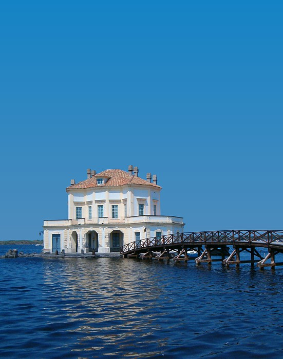 Het Casino Reale in het Lago di Fusaro bij Baia